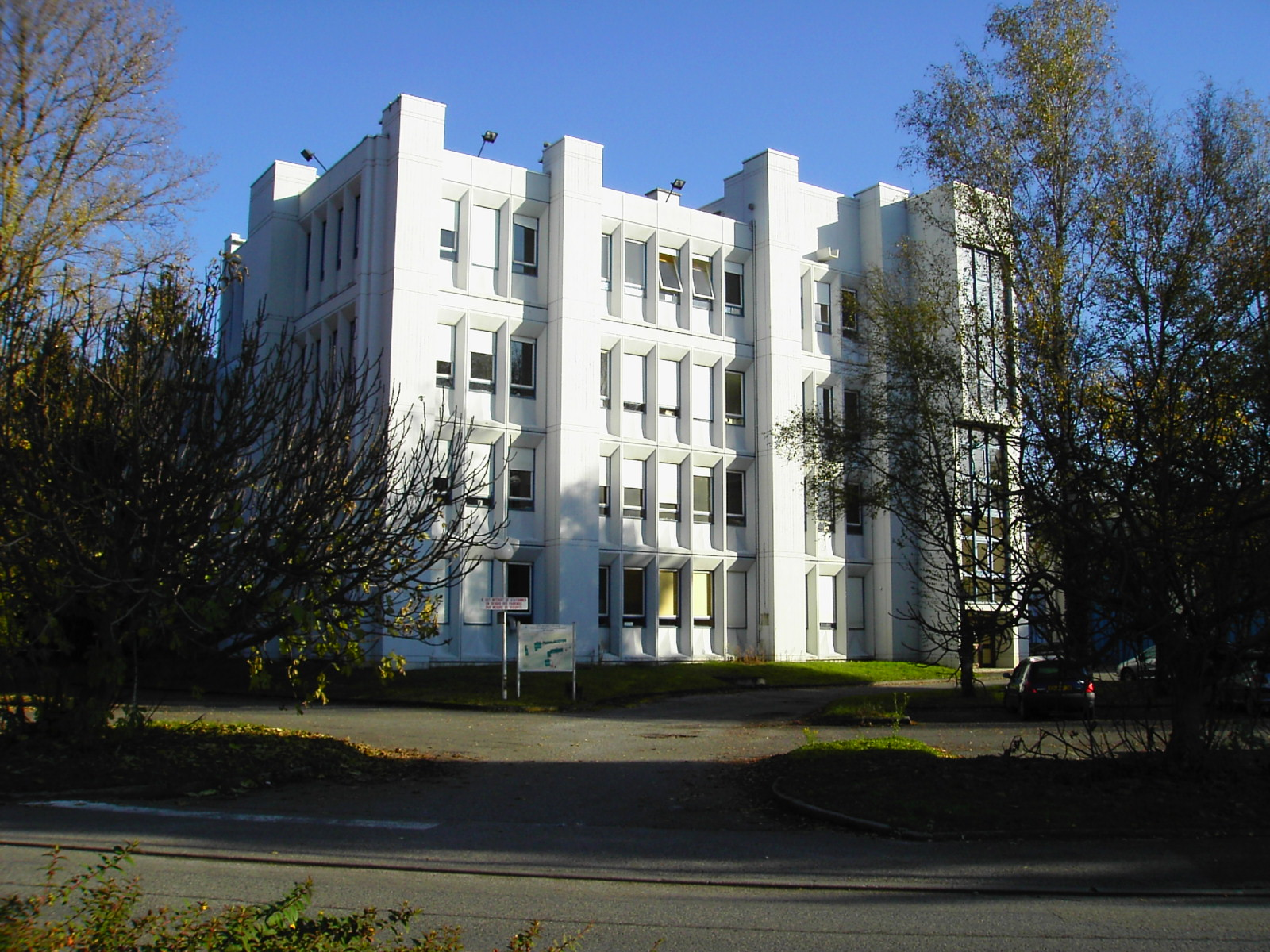 Ecole Nationale Supérieure d'Electrochimie et électrométallurgie, vue côté rue de la piscine - Campus de Grenoble